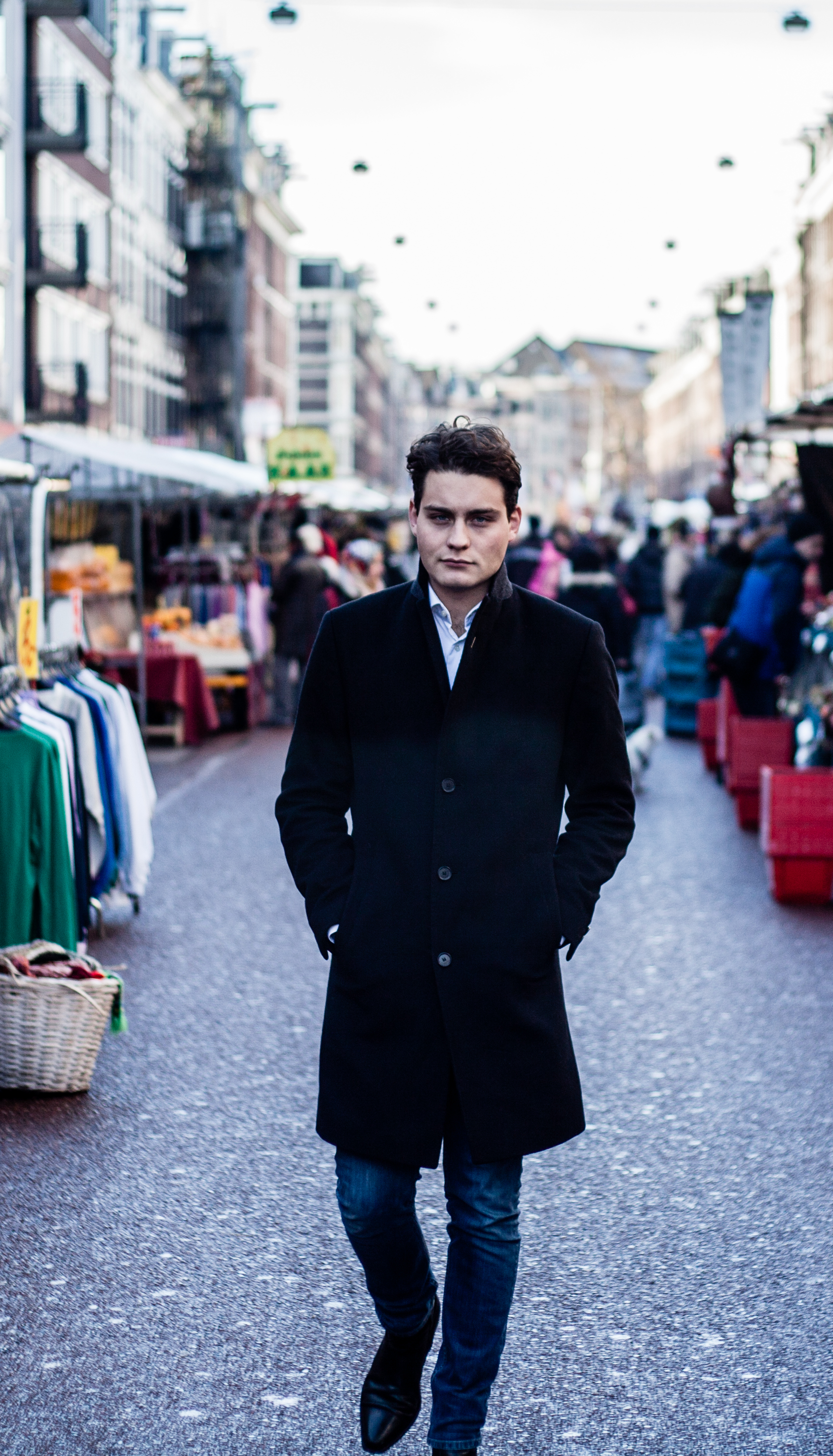 Douwe Bob